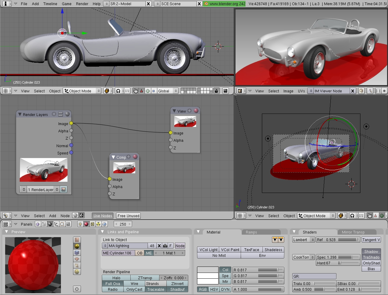 Igor Križanovskij, 2006; Blender 2.42a